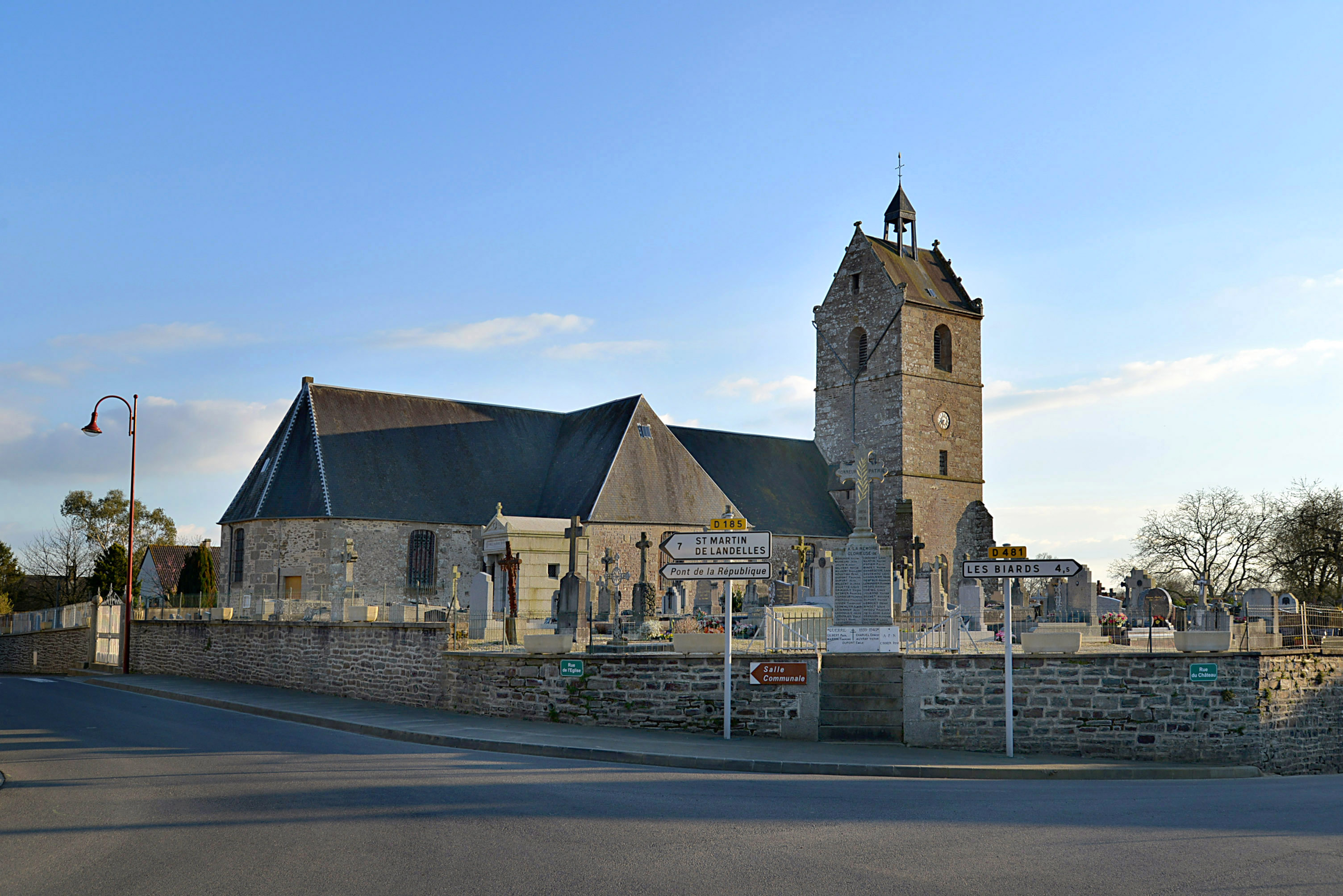 Virey (Manche)